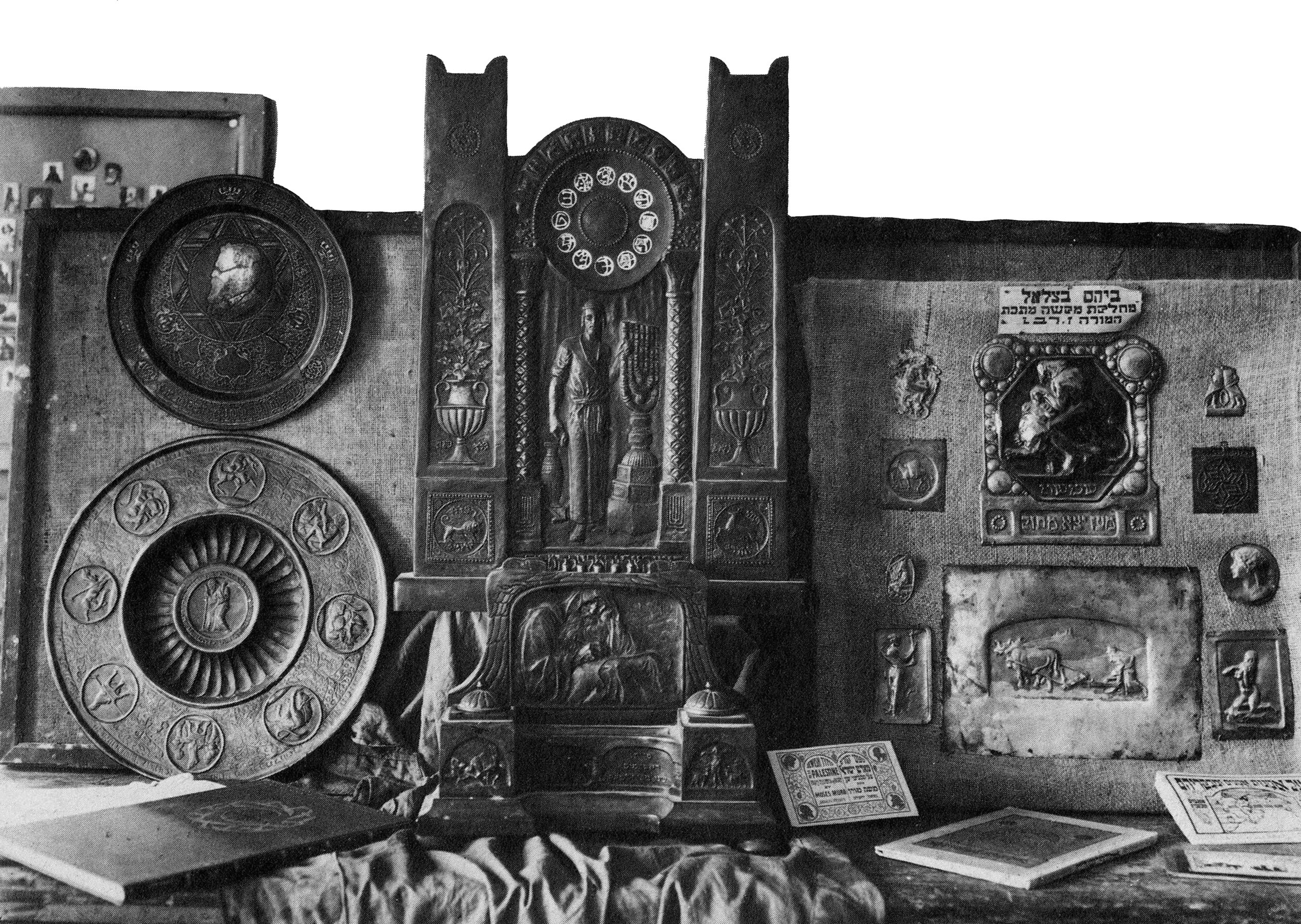 עבודות של מחלקת המקשה בבצלאל. תצלום מאוסף מוזיאון ישראל.